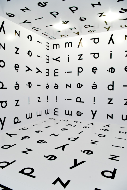 Widok instalacji pracy Między Stanisława Dróżdża w warszawskiej galerii appendix2